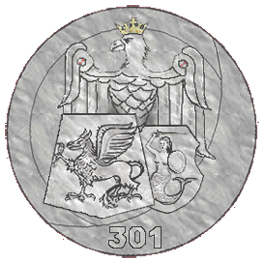 301 Dywizjon Bombowy "Ziemi Pomorskiej"